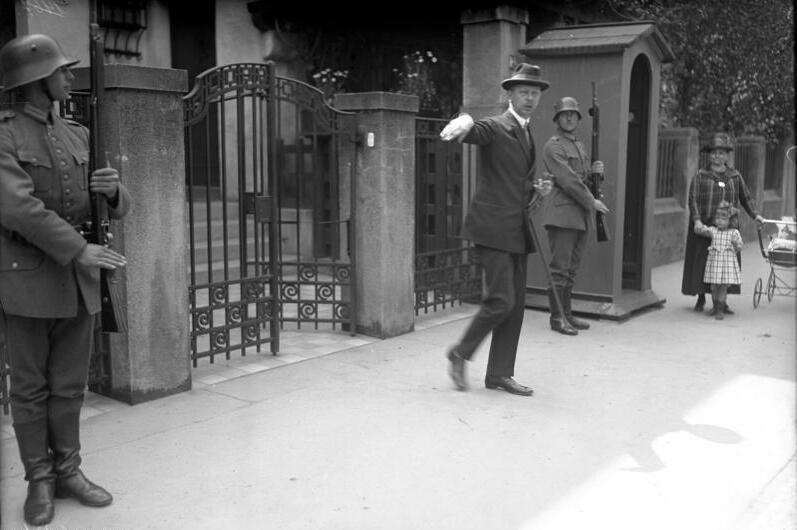 Information added by Wikimedia users.Verächter der Kamera! Auf der Jagd nach Fotografiergelegenheiten von Persönlichkeiten passiert es dem Fotografen oft, dass nicht jeder sich gern fotografieren lässt, sondern viele es versuchen, sich auf irgendeine Weise der Kamera zu entziehen, wobei ganz groteske Stellungen herauskommen. Der Sohn des Reichspräsidenten, Oberstleutnant von Hindenburg, liebt den Pressefotografen gar nicht. Eine abwehrende Handbewegung zeigt, dass ihm das Fotografieren nicht recht ist.